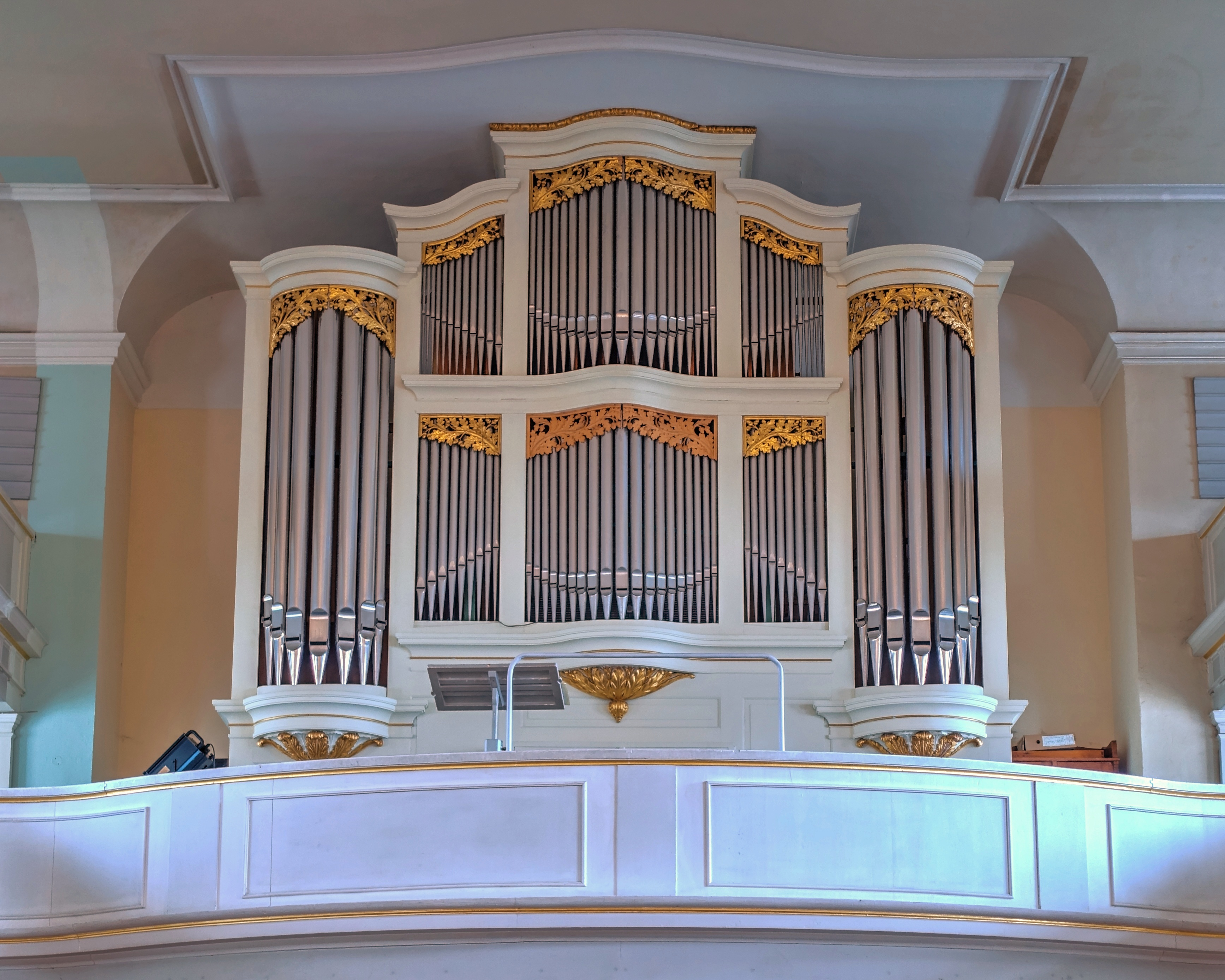 Die Gedächtniskirche Schönefeld in Schönefeld (Leipzig) in Sachsen 2020 - Orgel der Fa. Eule aus Bautzen von 1974